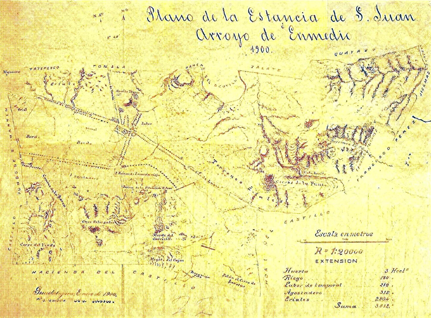 Fotografía de archivo de documento familiar.